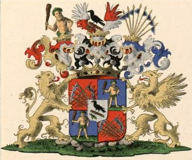 Klebecki suguvõsa vabahärravapp